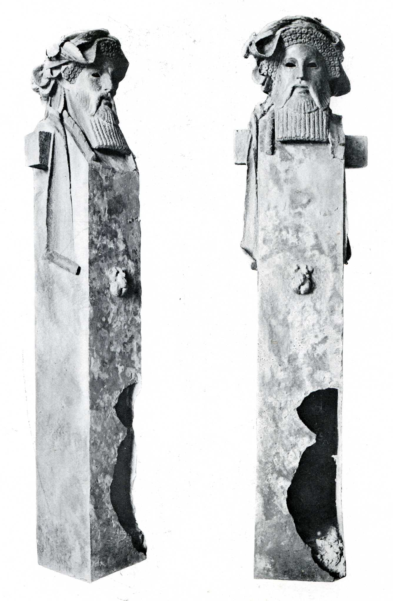 Pilier hermaïque du navire de Mahdia, dans le "catalogue du musée Alaoui" E. Leroux